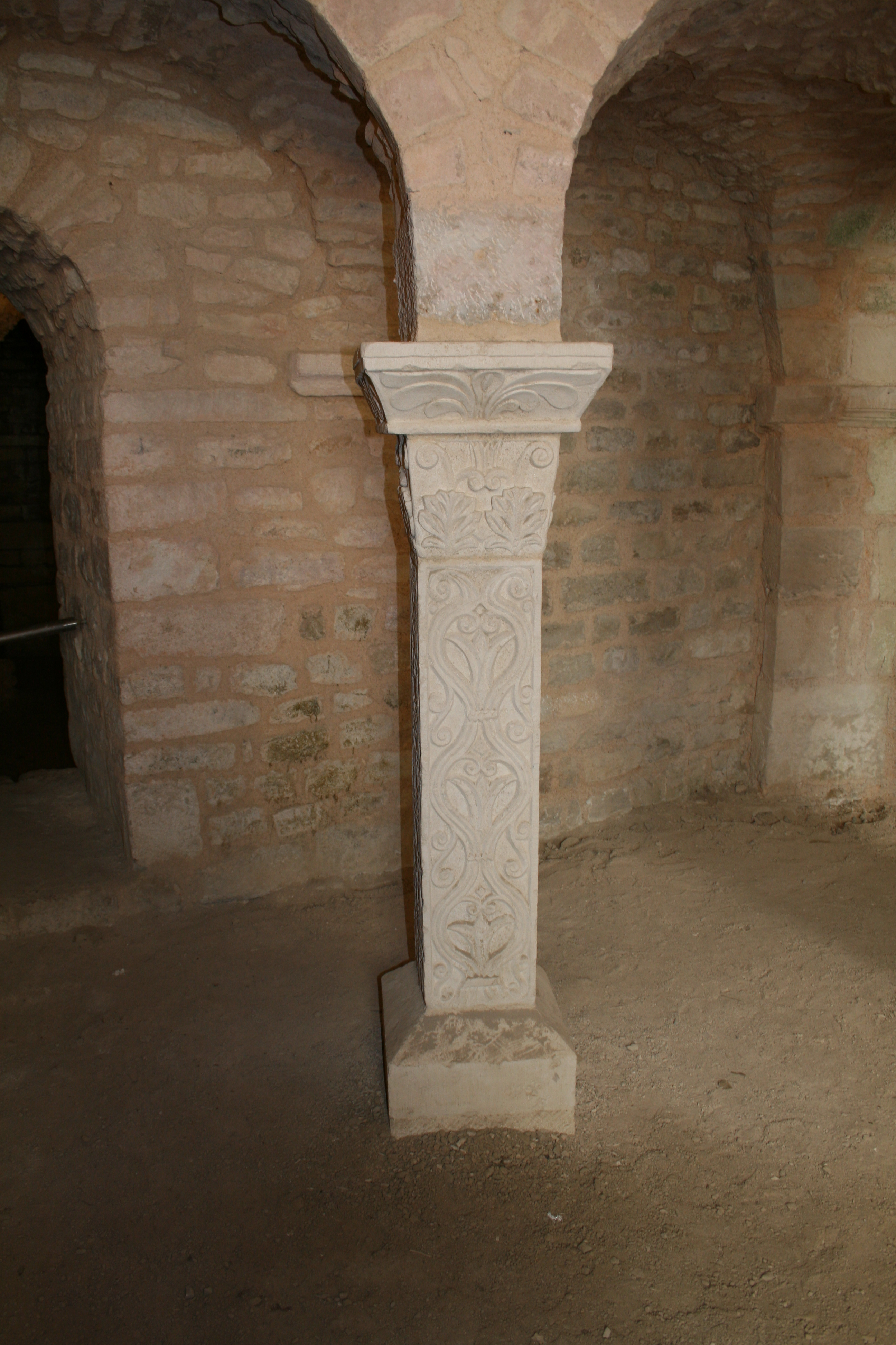 Flavigny-sur-Ozerain abbaye crypte pilier carolingien ( copie l'original est visible au musée lapidaire )